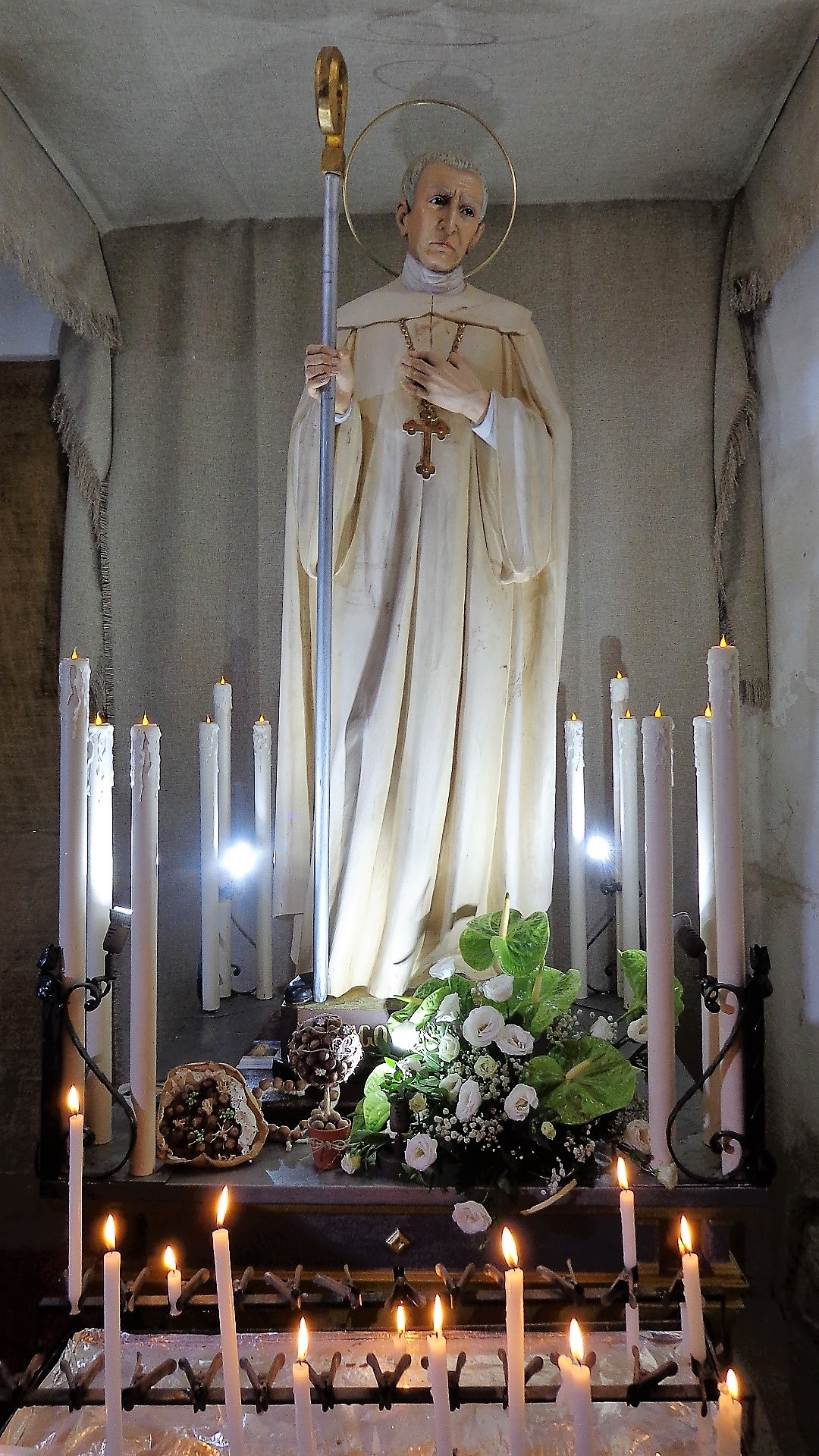 Sant'Ugo Abate Cistercense, simulacro custodito a Badia Vecchia di Novara di Sicilia.